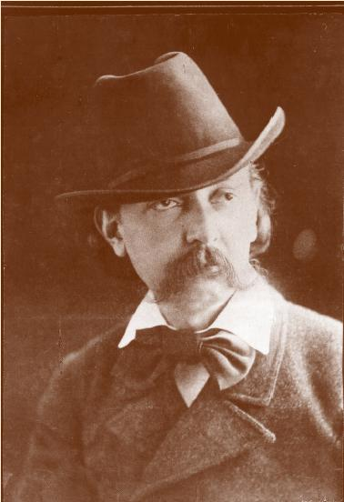 Foto di Mario Rapisardi, poeta